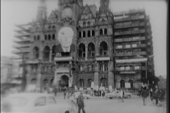 Obrovský plakát vyjadřující podporu prezidentu Svobodovi.